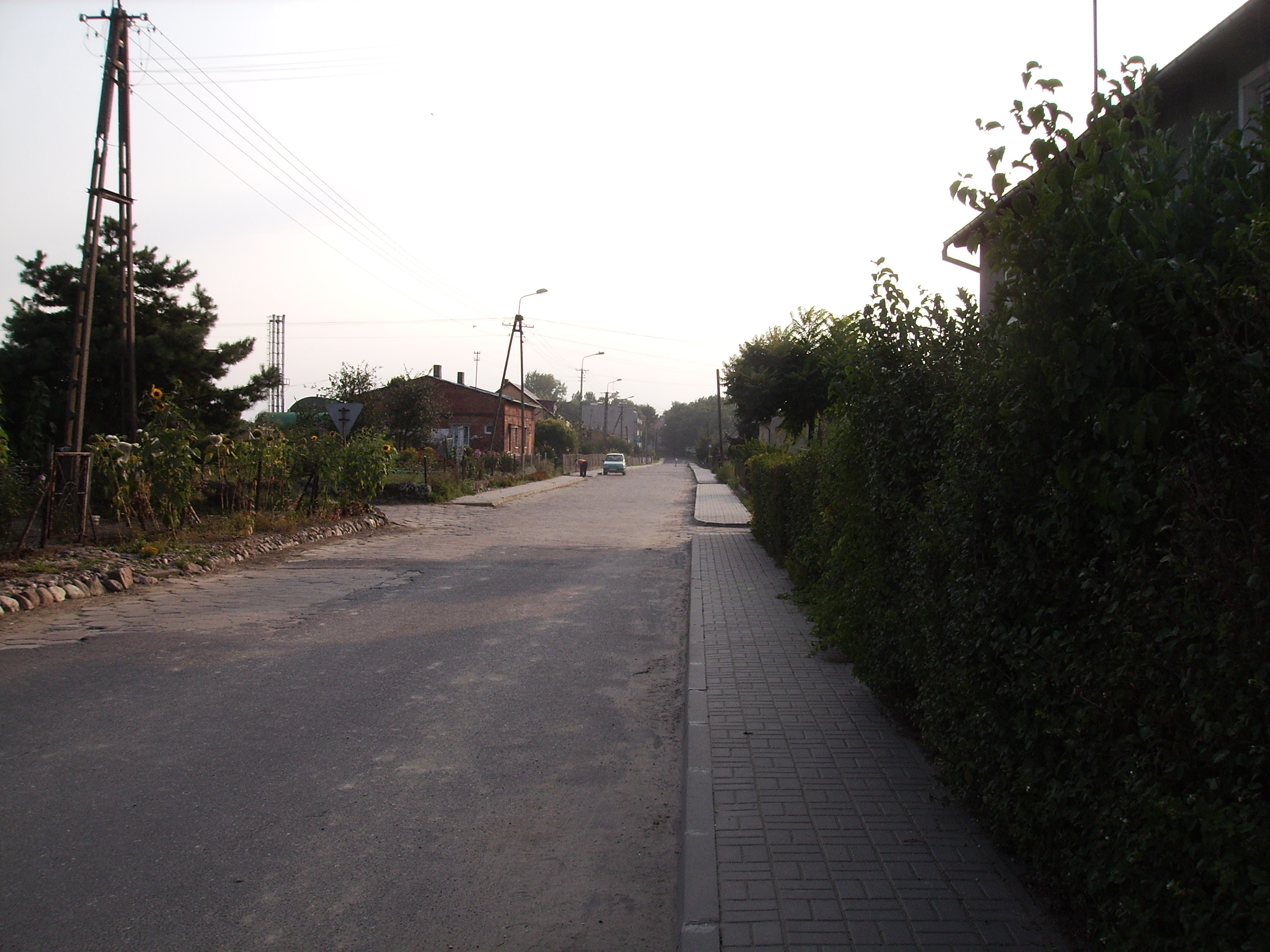 Wieś Wrocławki